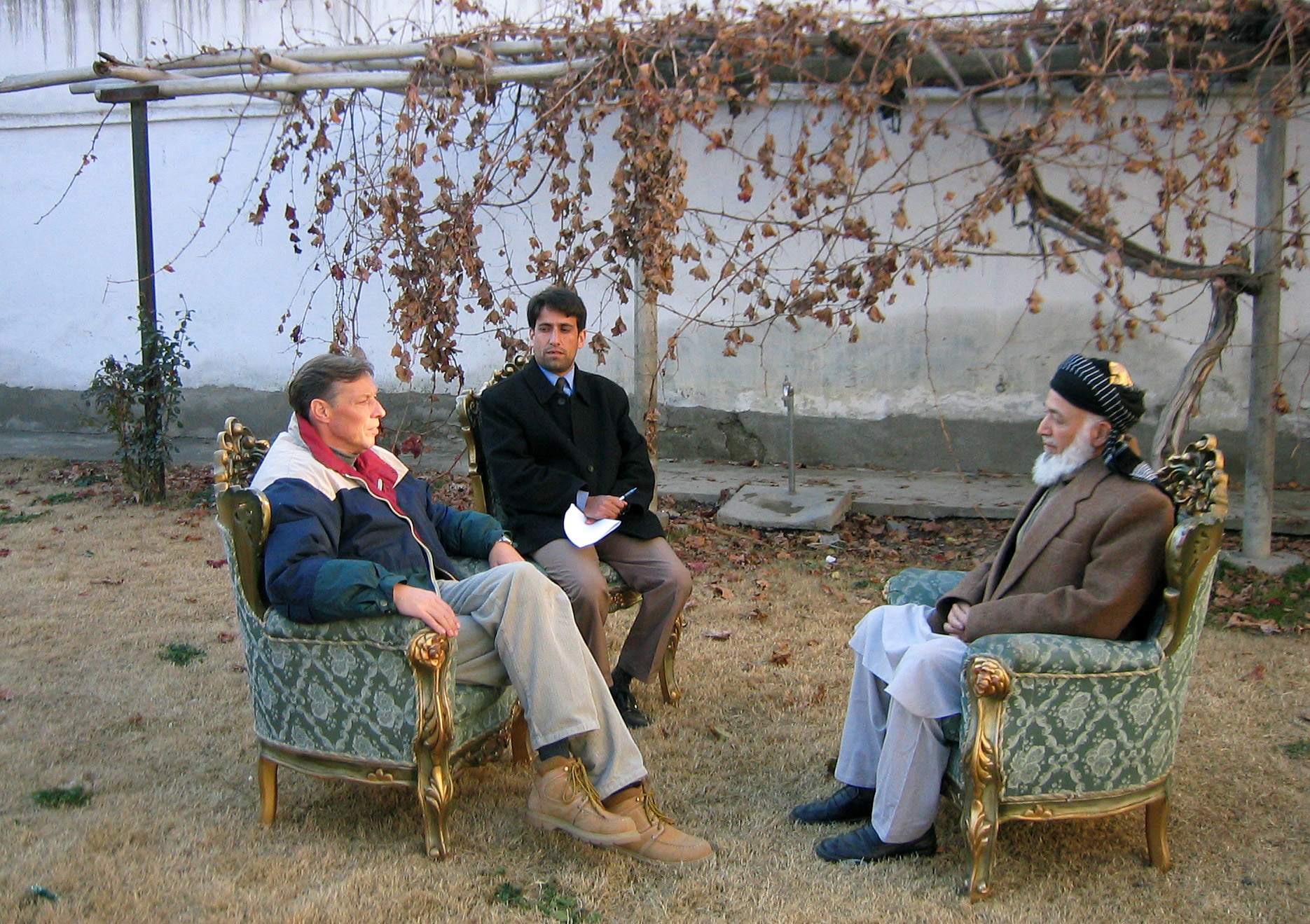 Rabbani is being interviewed for German TV by Armin-Paul Hampel, Kabul, 2003